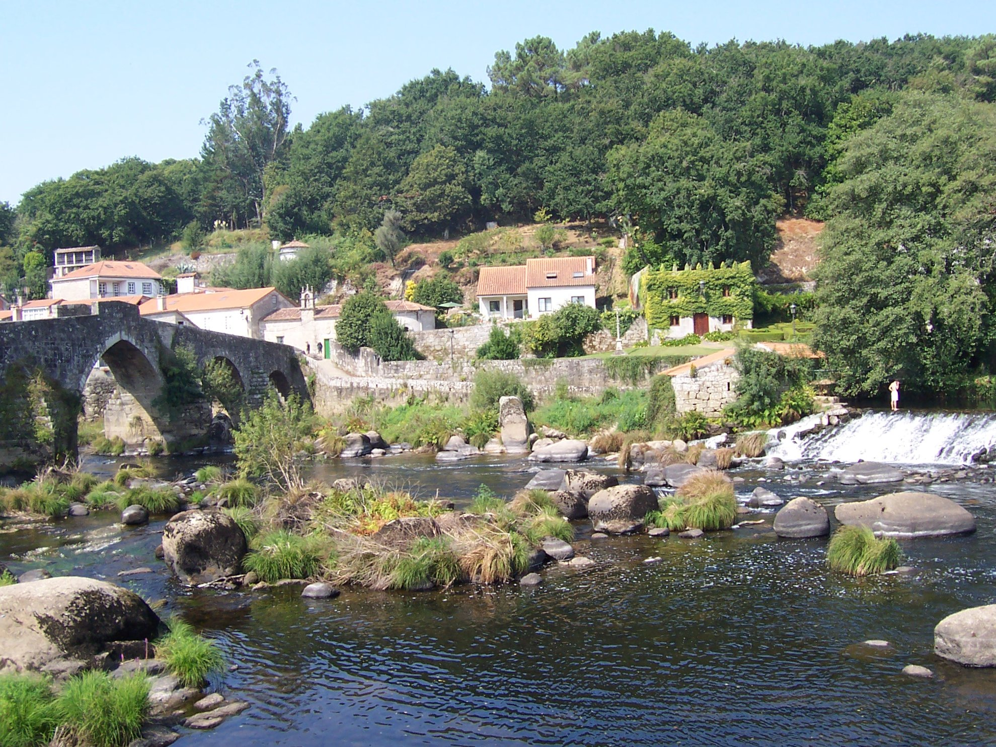 Vista de Ponte Maceira